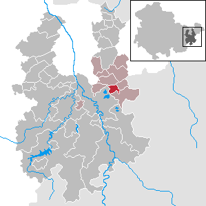 Gauern in Thuringia - District Greiz